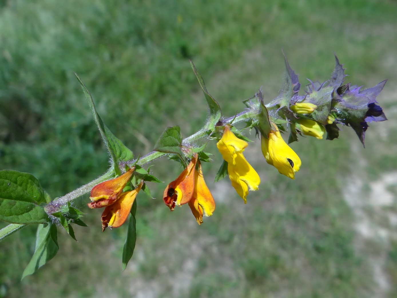 Melampyrum nemorosum. Location: Poland